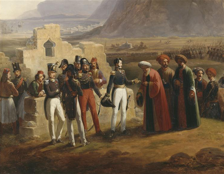 Épisode de l'expédition de Morée en 1828 : prise de Patras dans le golfe de Lépante par le général de brigade Schneider, le 4 octobre 1828